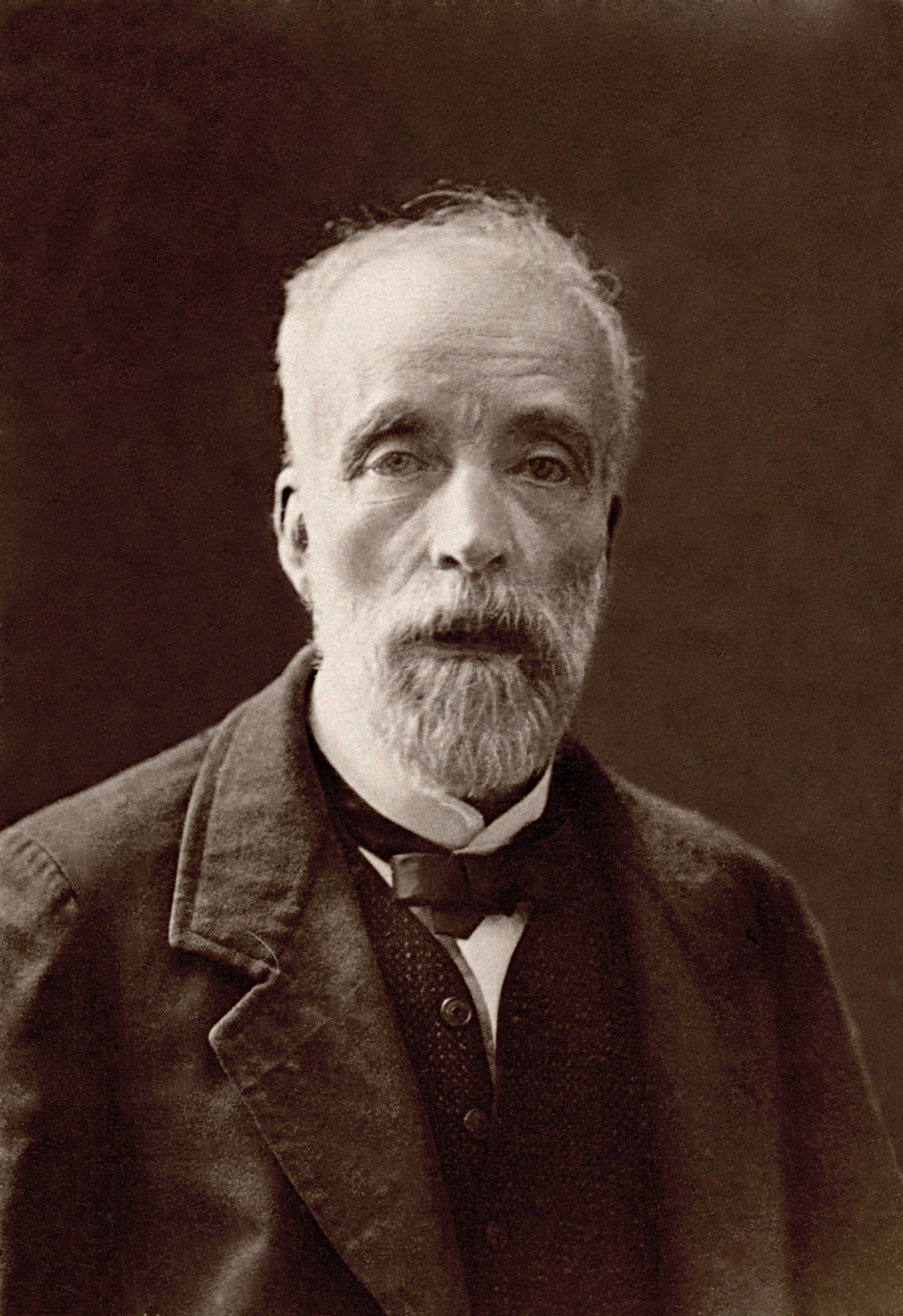 Alexandre Legentil (1821 - 1889), commerçant, initiateur de la construction de la Basilique du Sacré-Cœur de Montmartre à Paris